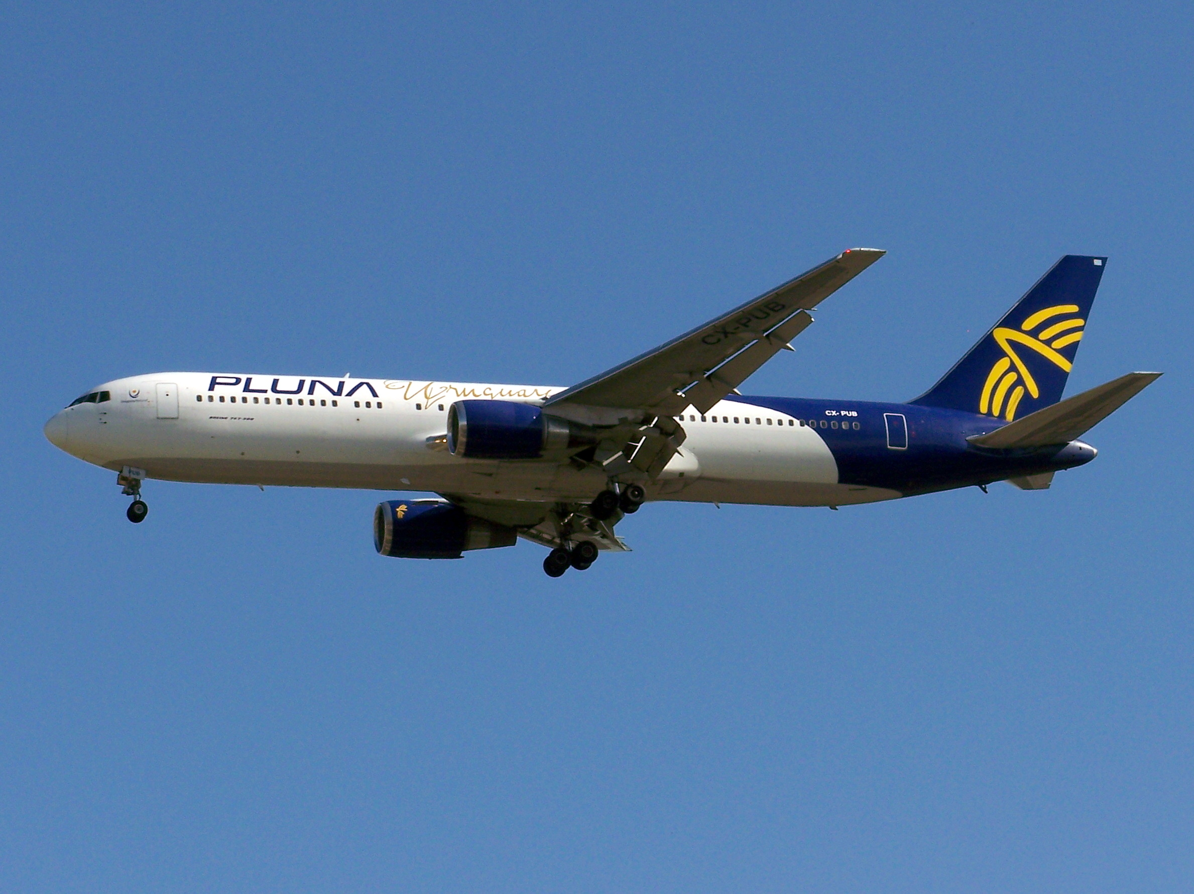 CX-PUB, vuelo PUA0802 MVD en final para MAD33L; Boeing 767-33AER, cn 28495/643